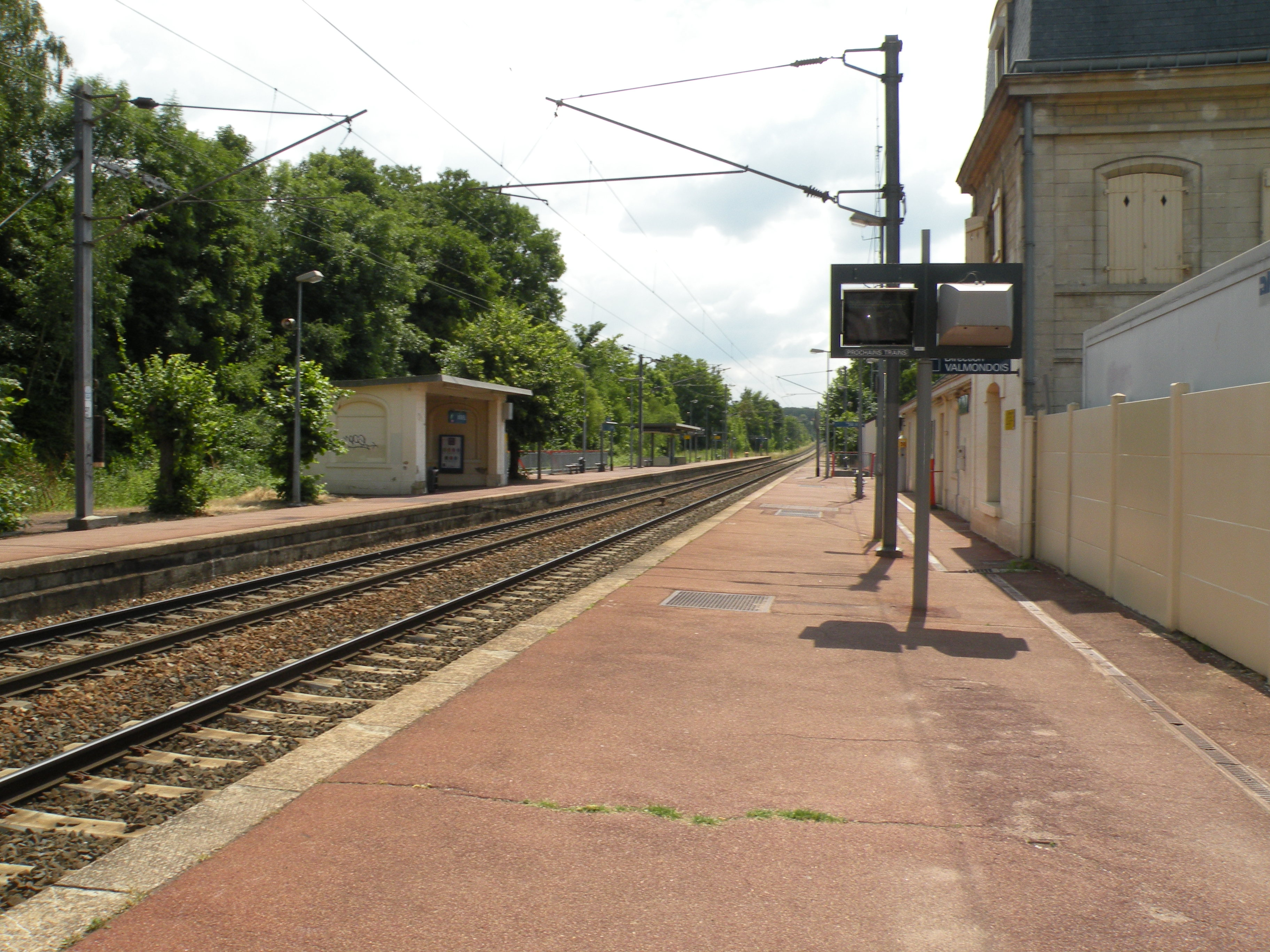 quai de la gare de Mériel, Val-d'Oise France